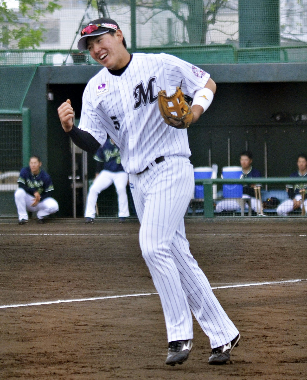 千葉ロッテマリーンズ安田尚憲選手